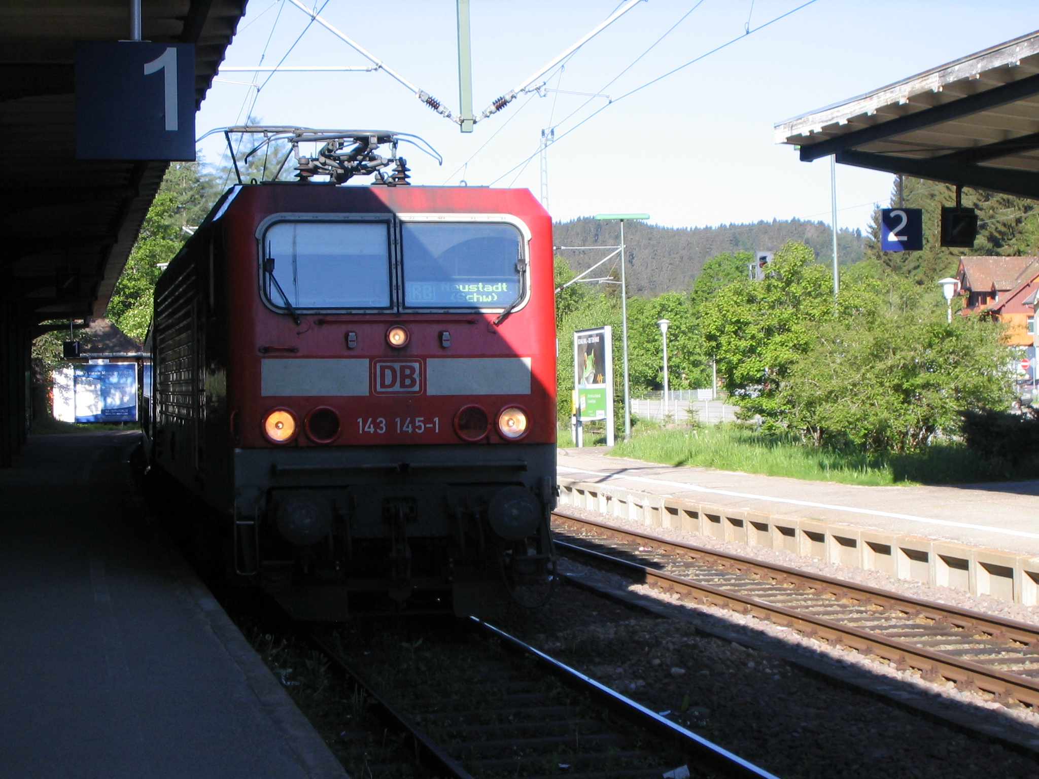 DB 143 145 mit Doppelstockzug auf der Höllentalbahn bei Einfahrt in den Bahnhof Titisee